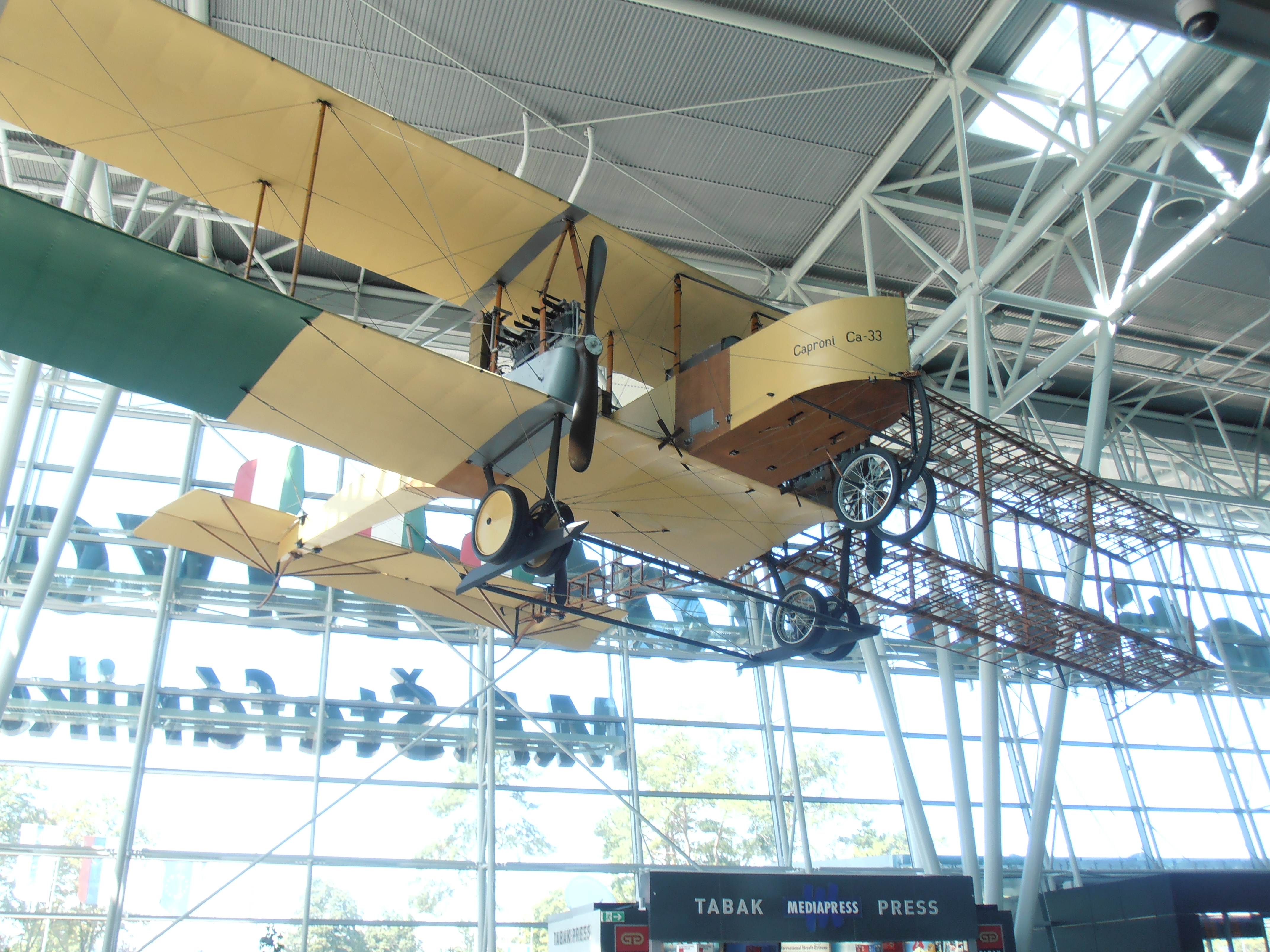 Lietadlo Caproni Ca.33, na ktorom v roku 1919 zahynul M. R. Štefánik